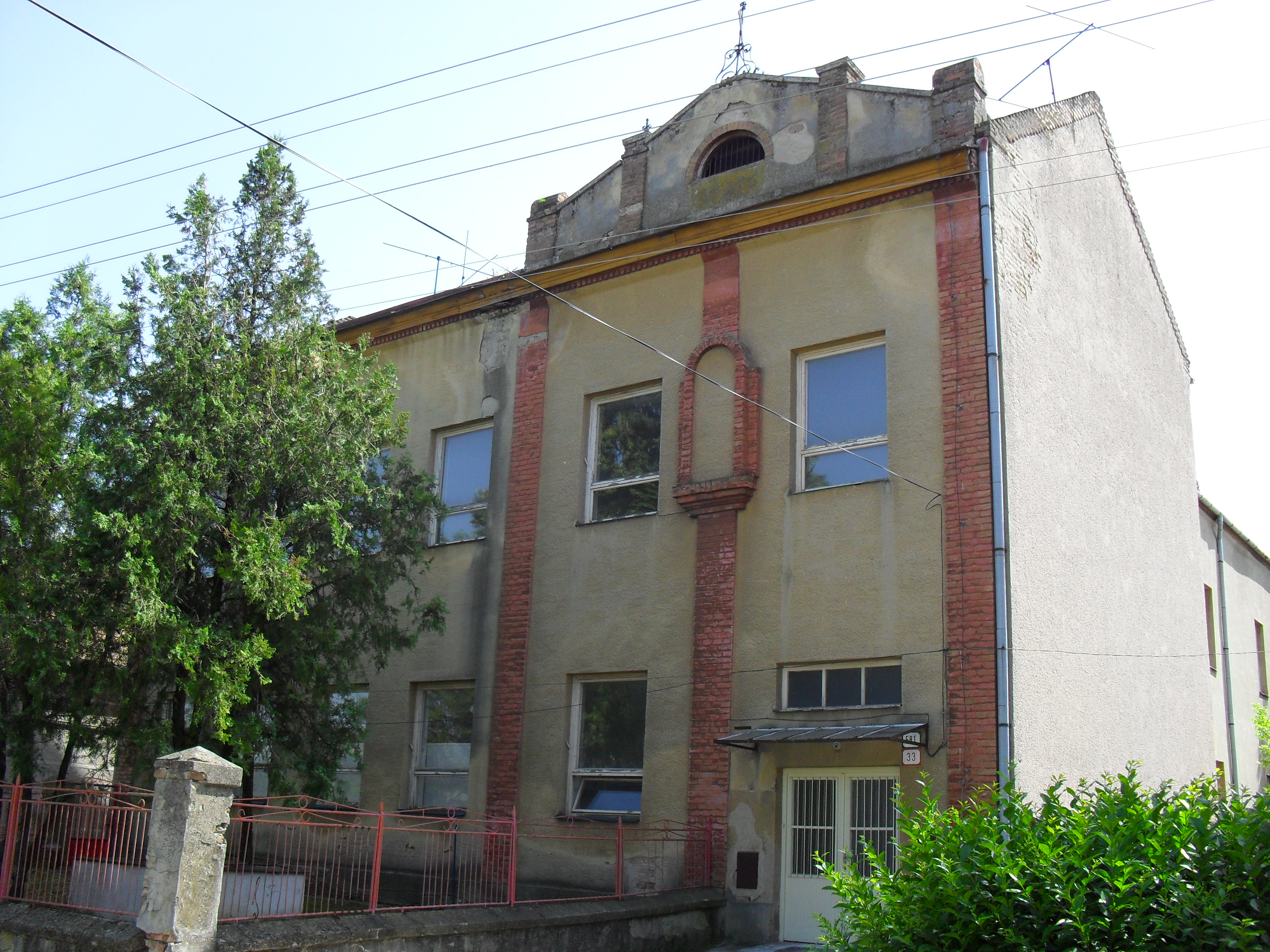 Perbete - Fő utca